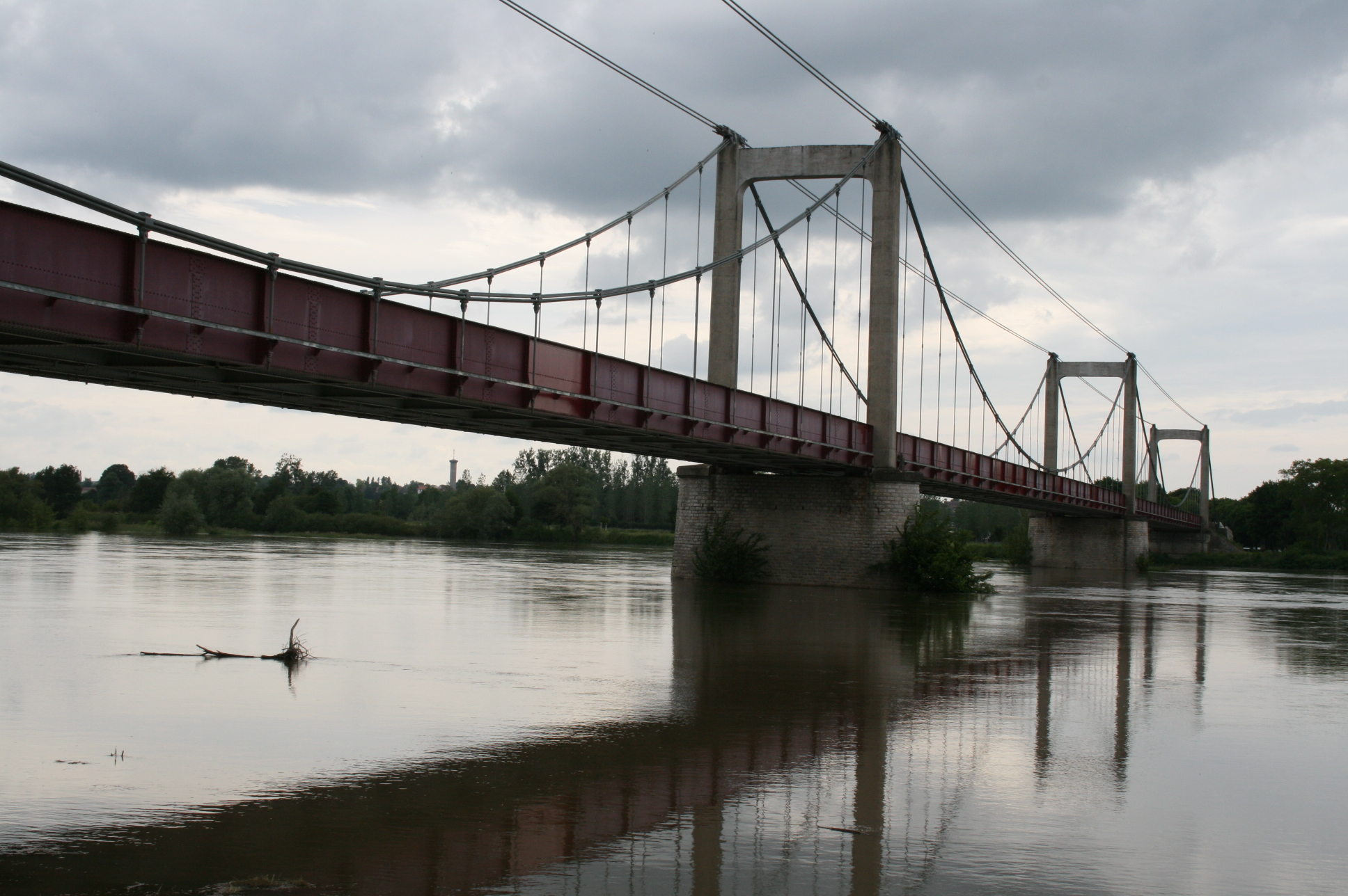 Pont de Bonny-sur-Loire (Loiret - France) - pont suspendu franchissant la Loire